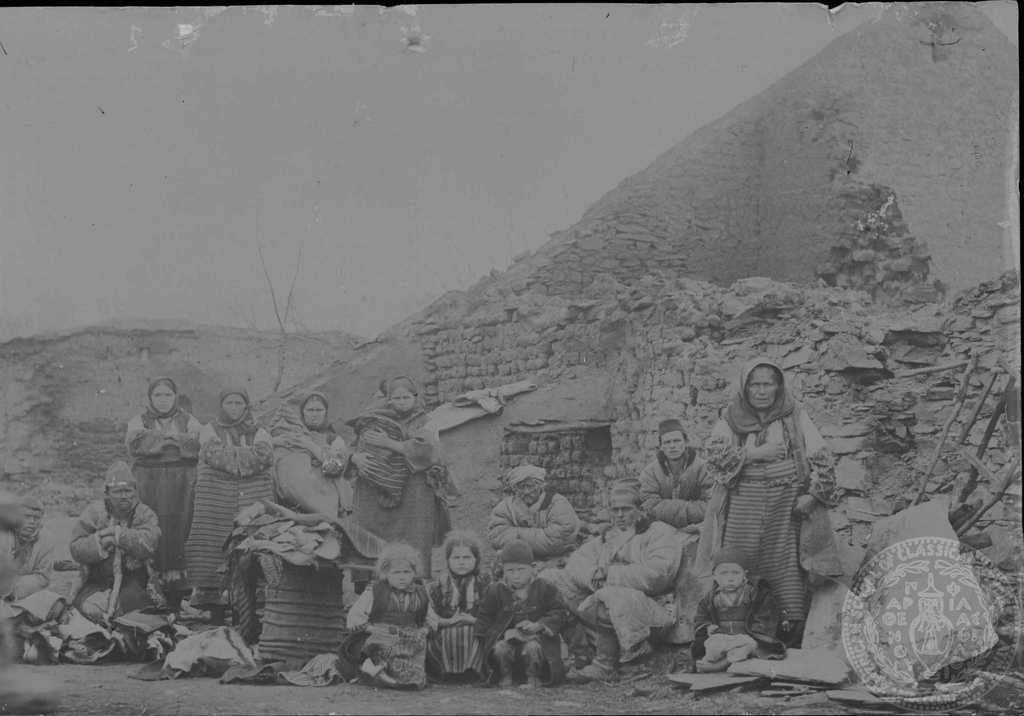 Сърбци след нападение на чета на ВМОРО